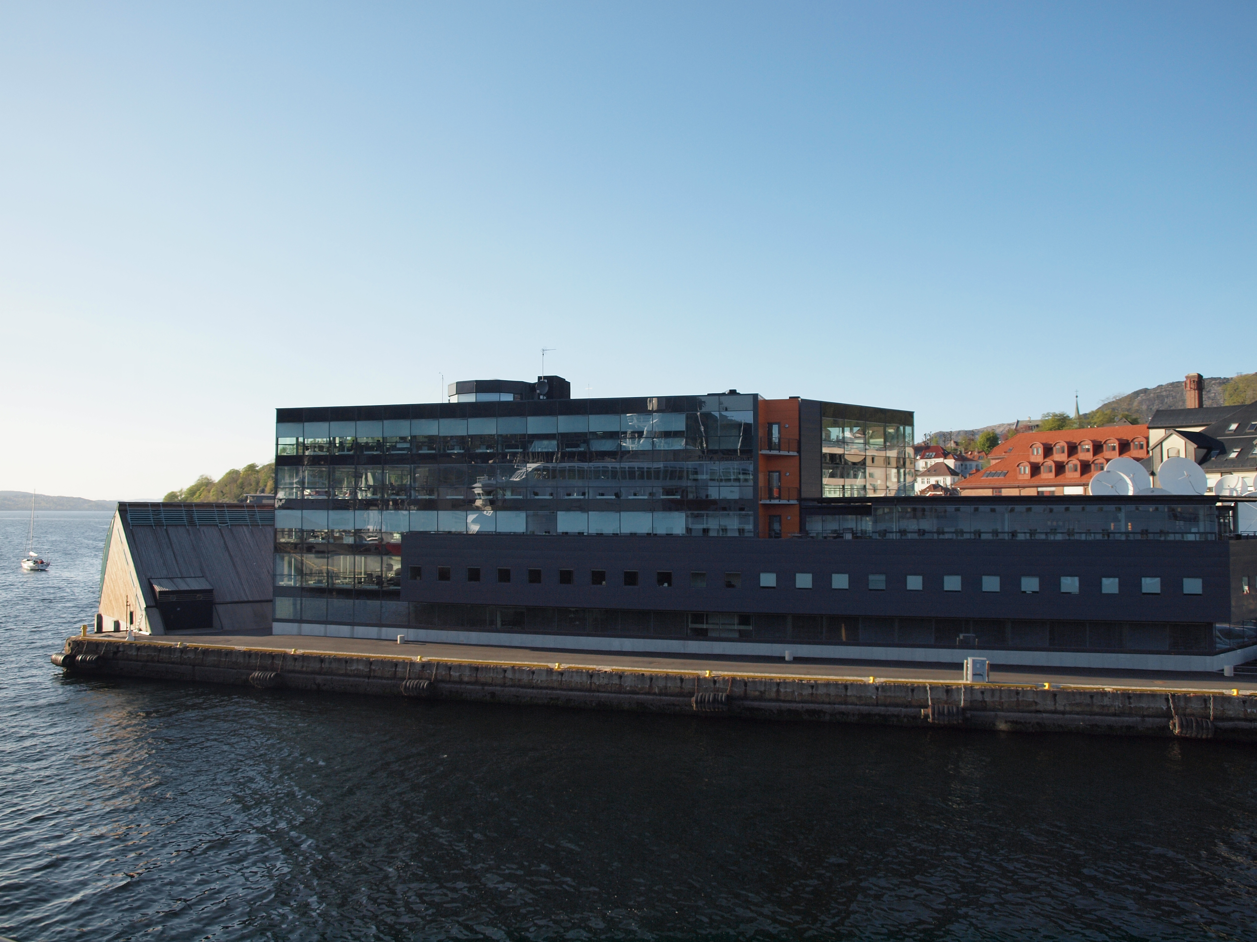 Vizrt, Bergen, Norway